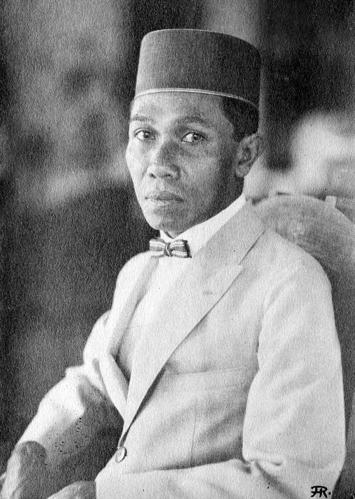 Repronegatief. Portret van de Sultan van Bima